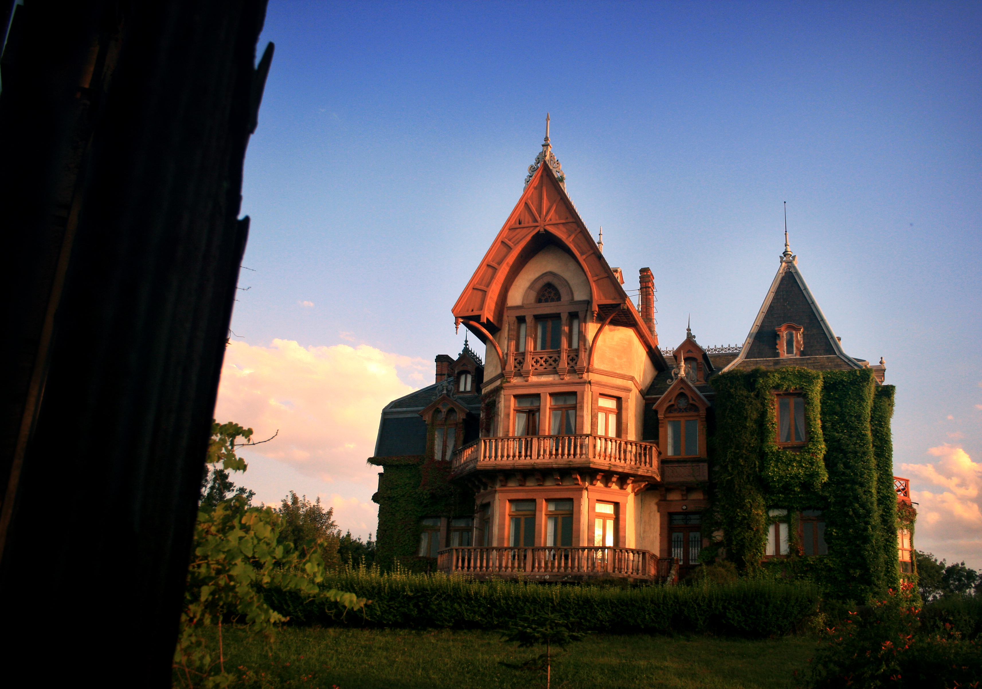 Arquitecto: Francisco Hernández Rubio Año de construcción: 1899-1902 Periodo: Historicismo ingles (tipo ingles) Finalizando el siglo XIX, la influencia de la arquitectura inglesa llegó a Comillas, como consecuencia de la admiración de la burguesía española hacia el mundo anglosajón. Francisco Hernández Rubio proyectó para el prado de San José el Chalet del Duque de Almodóvar del Río. Toma su nombre de los famosos “chalets” suizos y sus formas de la admirada arquitectura inglesa, insistiendo en todos los elementos tópicos de estos supuestos estilos rústicos: asimetría, multiplicidad de ejes, labores de madera y ladrillo, etc. Contrastando con el eclecticismo del Palacio de Sobrellano y el modernismo del Capricho de Gaudí. En la fachada sudeste existe un escudo timbrado por yelmo afrontado con corona de duque y cimera que representa un rey coronado u con cadena la cuello. Lleva en derredor de la tarjeta un adorno de banderitas cargadas de signos o escudetes. El campo es cuartelado y con escuson.